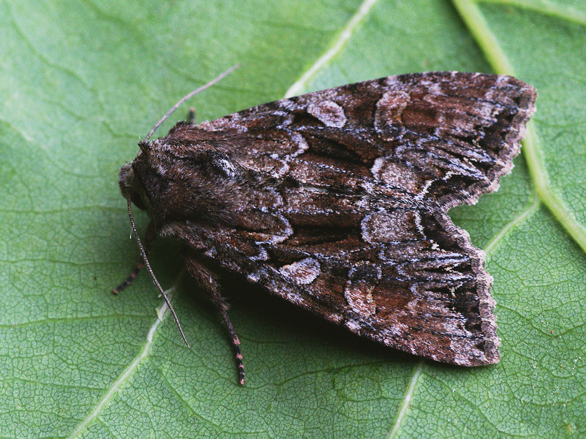 Exemplar found: Russia, Moscow Oblast, Odintsovsky District, near village Pestovo, 21.06.2017, by light МО, Одинцовский р-н, окрестности деревни Пестово, 21.06.2017, на свет